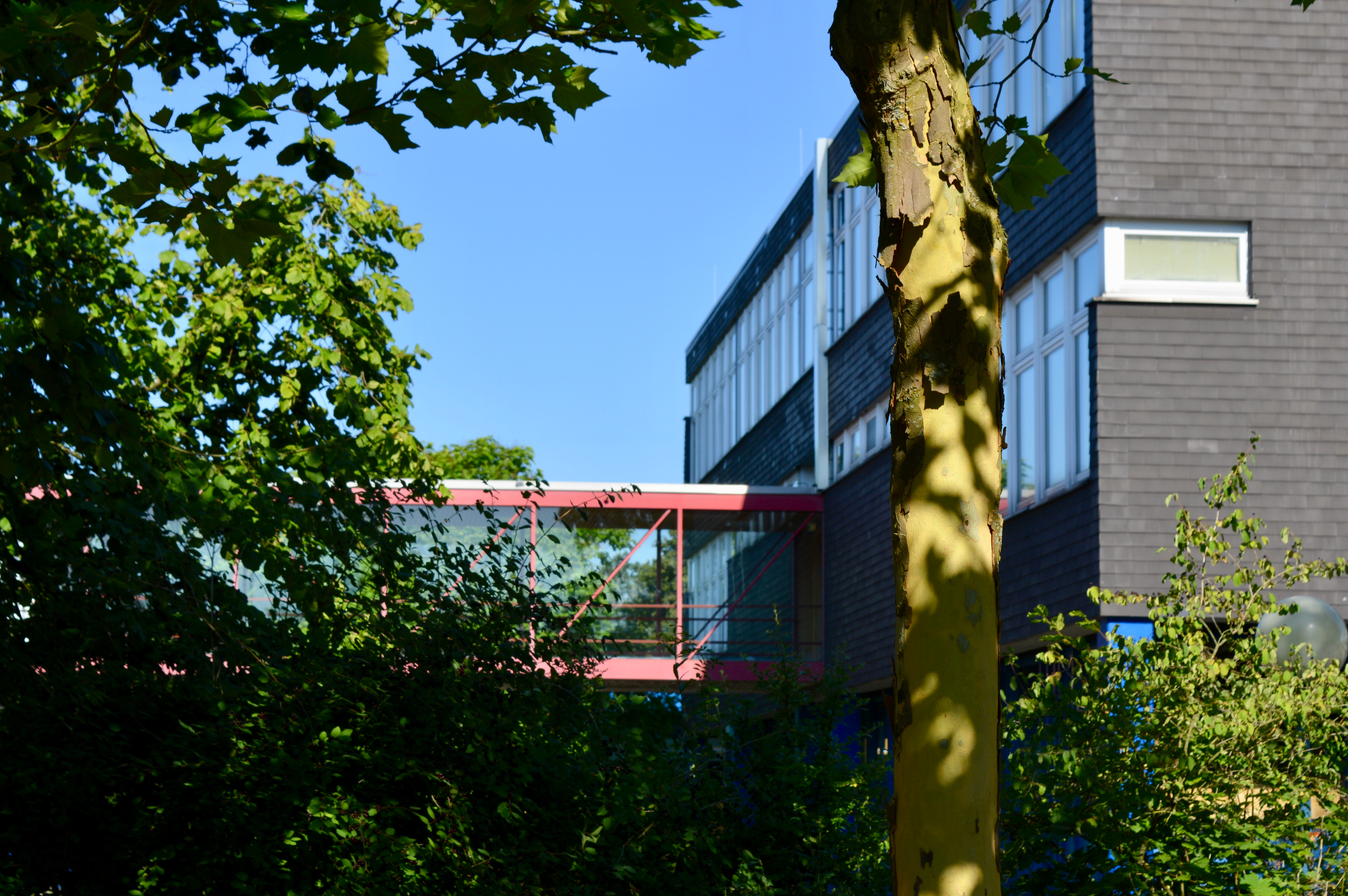 Das Bild zeigt die Brücke zwischen dem Hauptgebäude und dem Fachklassentrakt. Die Ansicht ist vom Erweiterungsbau für die 5. und 6. Klassen aus gewählt.